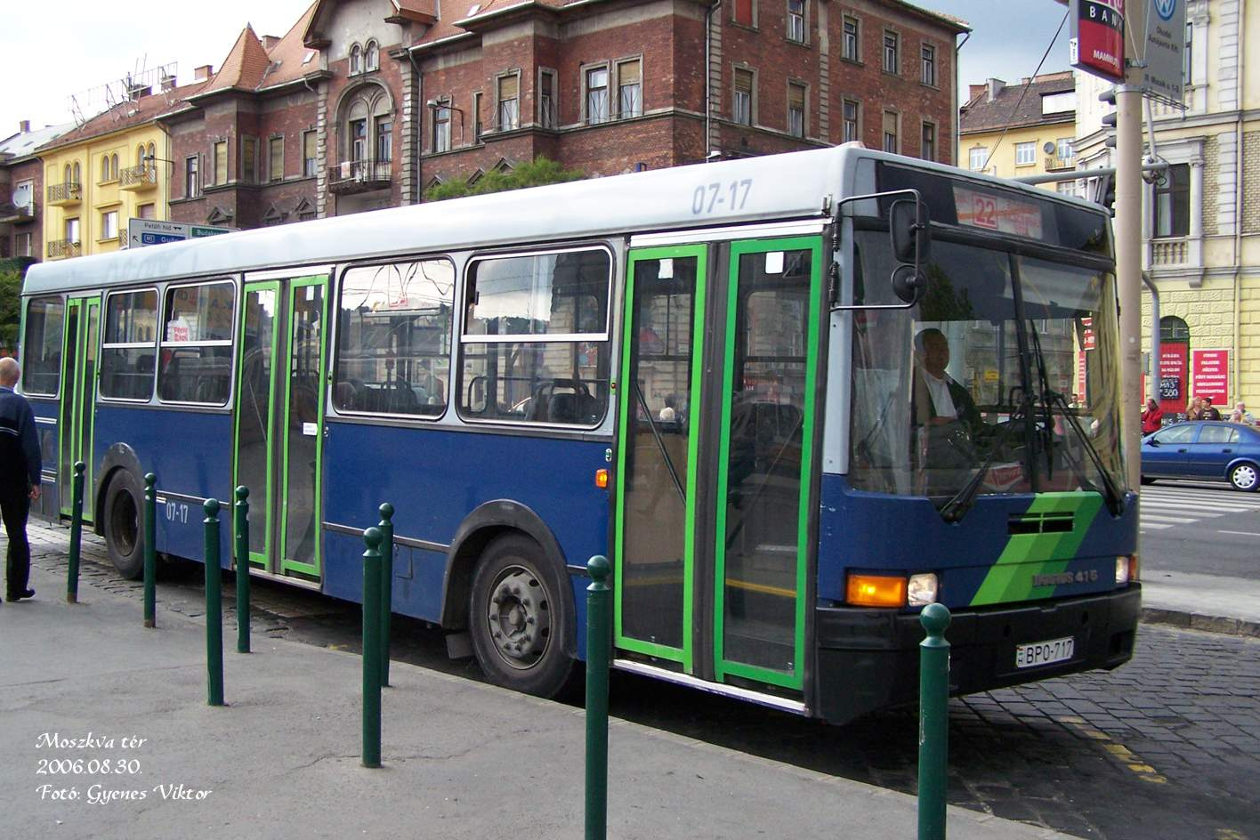 Gyors 22-es jelzésű Ikarus 415-ös busz a Moszkva téren